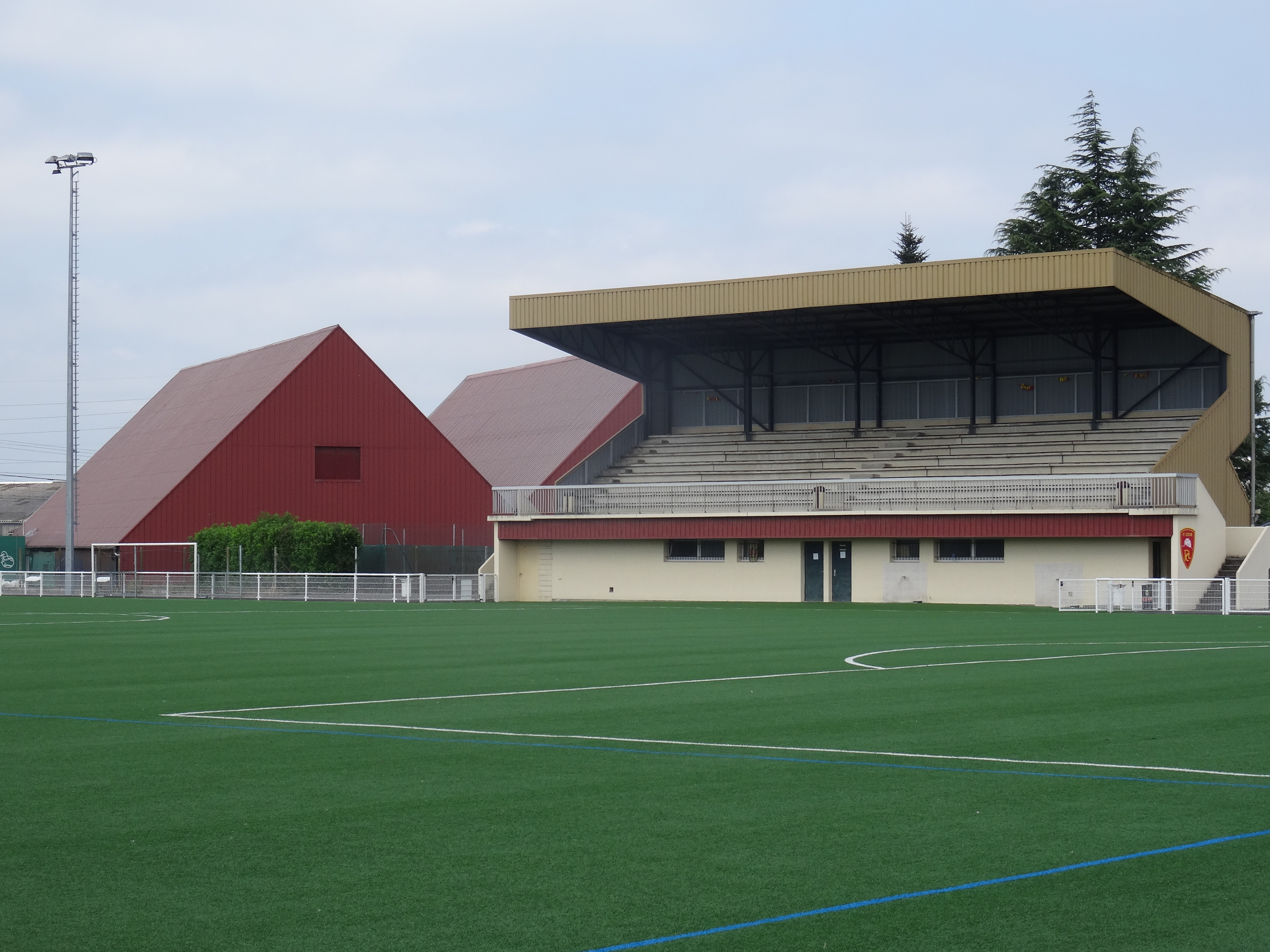 Stade de football de Lescar (stade Bernard Masseillou)